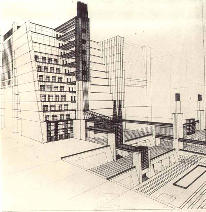 Casa a gradinata con ascensori dai quattro piani stradali.